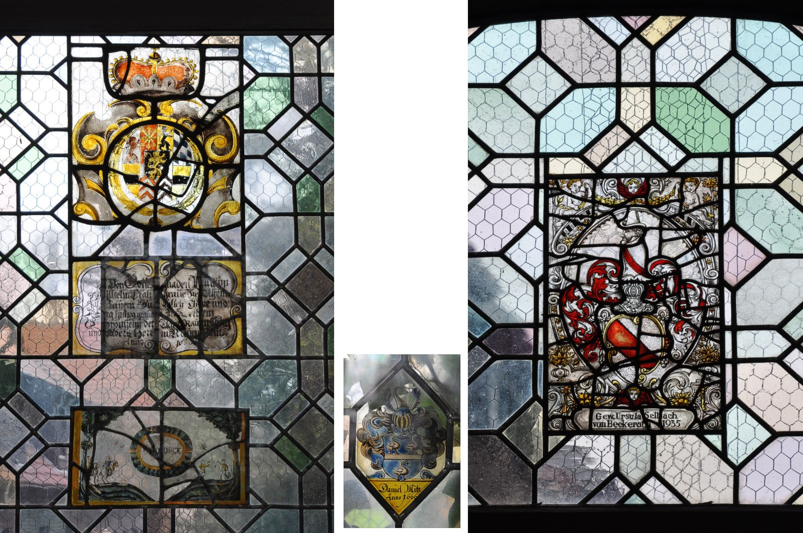 Haus Traar 2009 Fenster Kapelle